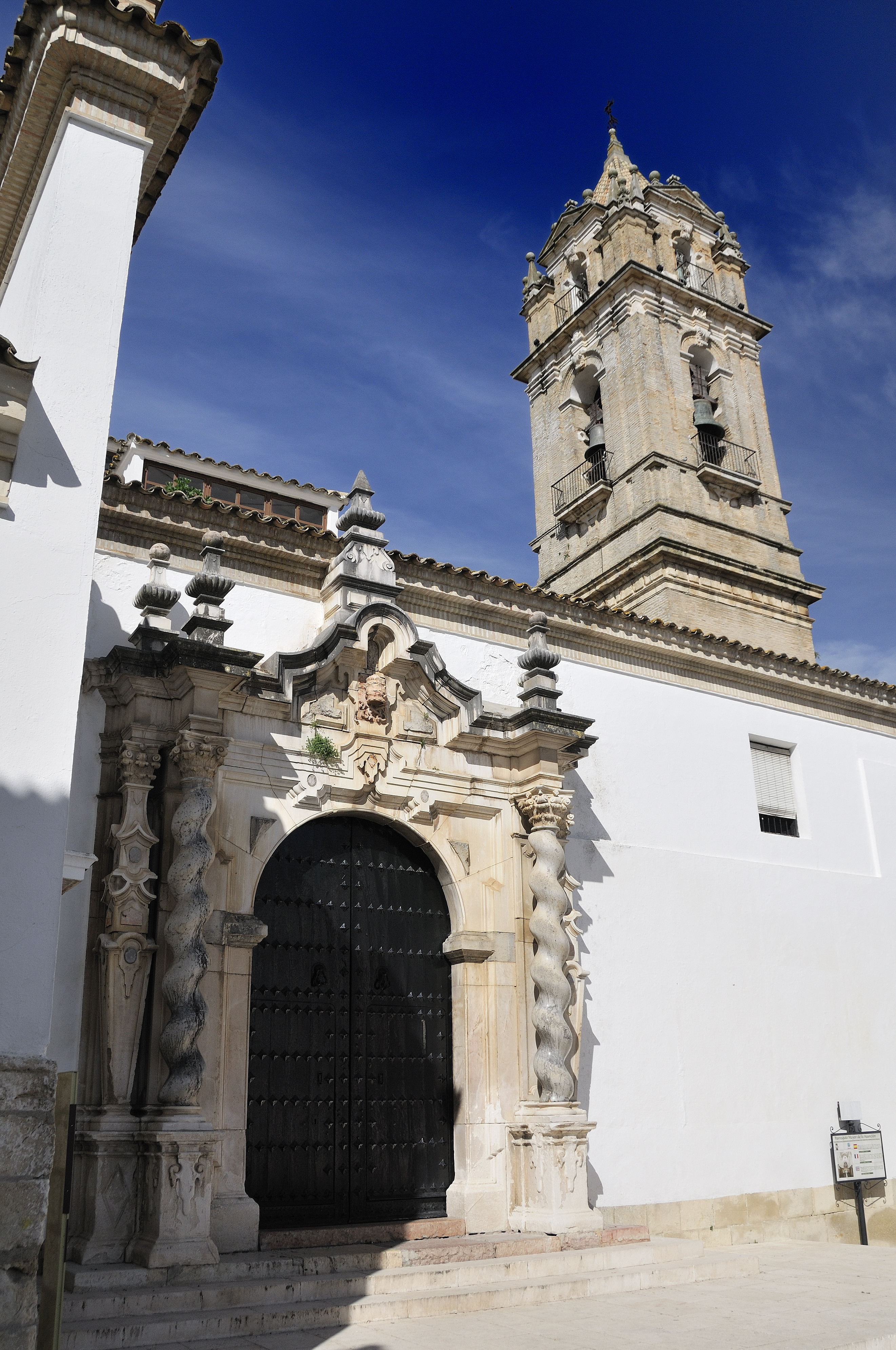 Iglesia de Ntra. Sra. de la Asunción. Cabra. Córdoba.